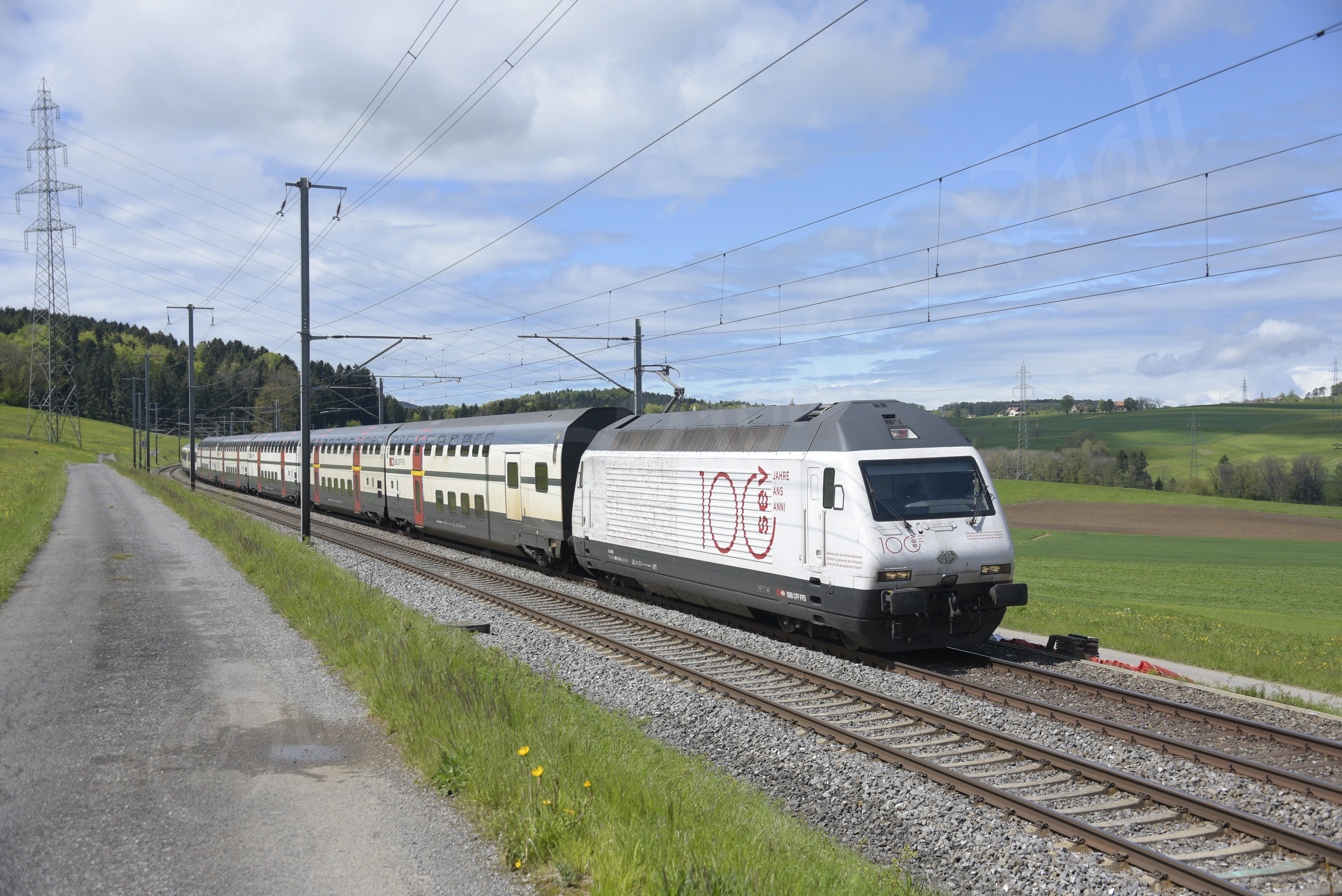 Re 460 113 °Irchel° porte la publicité pour les 100 Ans SEV Ici à Granges (Veveyse)